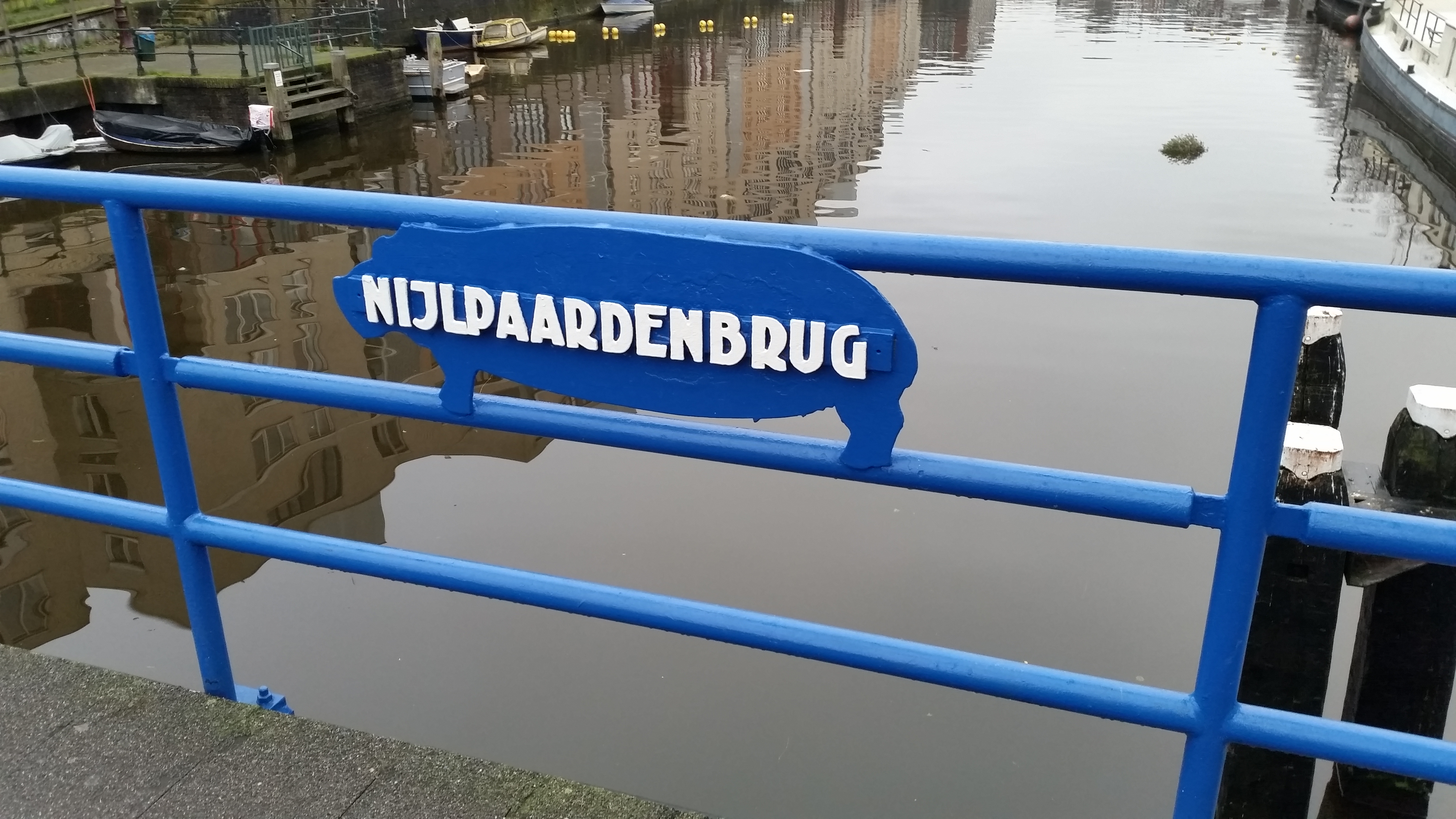 Impressie van brug 1907, de Nijlpaardenbrug in Amsterdam-Centrum